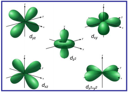 Kristal eremuaren teoria